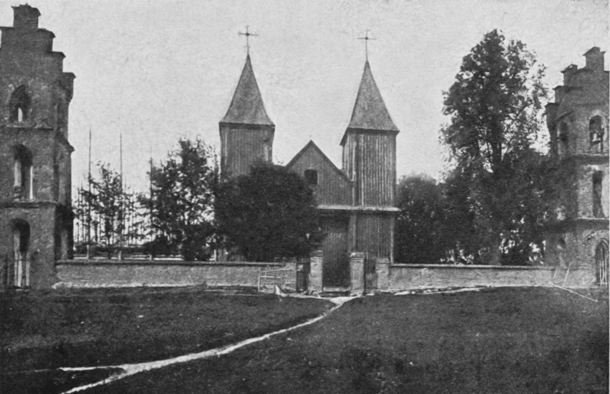 Беларуская (тарашкевіца): Росіца (Rosica). Стары касьцёл